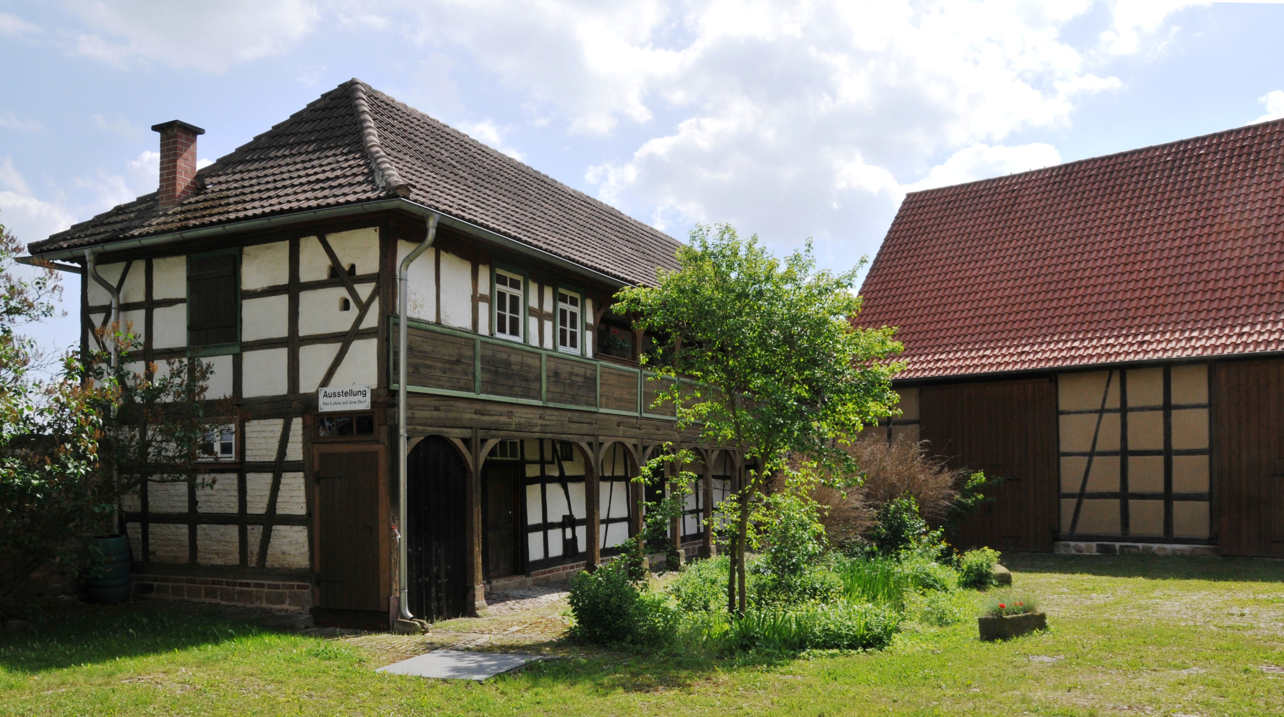 Nebengebäude der Kirche in Apfelstädt